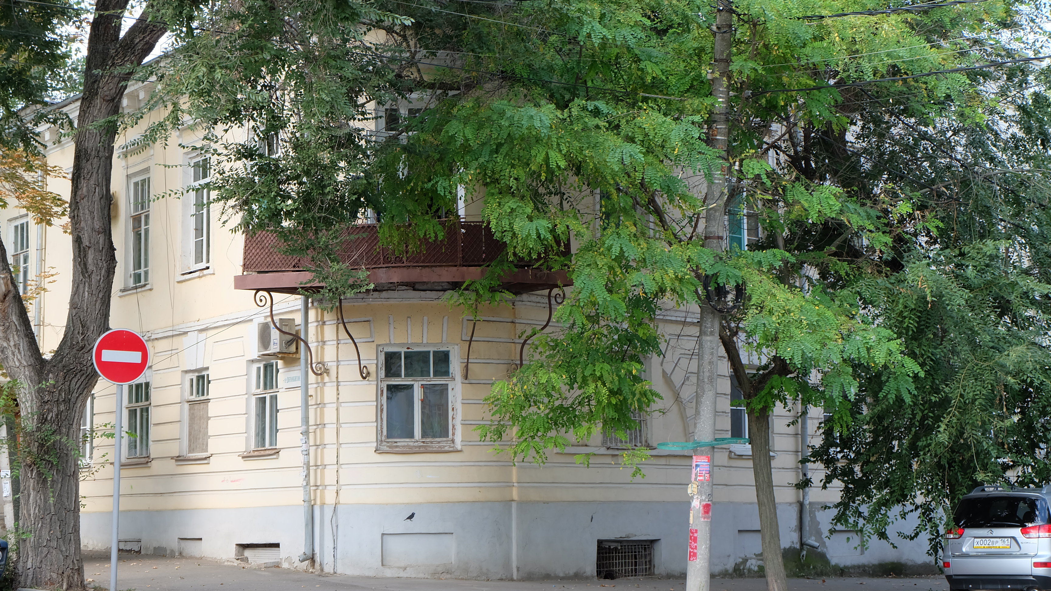 Здание городской библтотеки, которую посещал писатель А.П. Чехов: улица Греческая, 55, Таганрог, Ростовская область